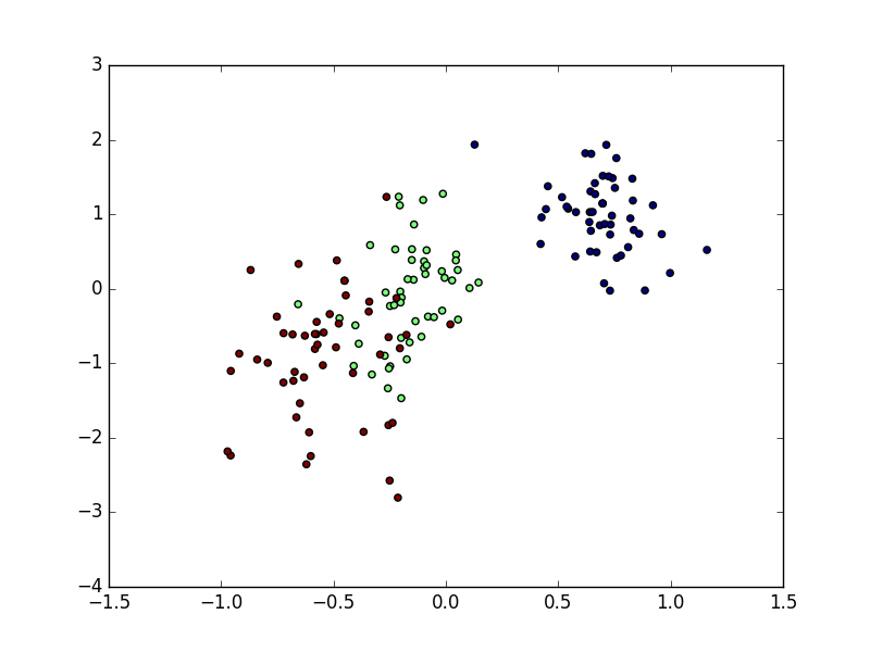 Exemple de distribution de la base de donnée Iris en deux dimensions. Nous pouvons observer que les classes peuvent se superposer.